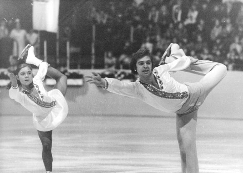 Romy Kermer, Rolf Österreich ADN-ZB Gahlbeck 12.12.1975 Berlin: DDR-Meisterschaften im Eiskunstlaufen vom 12.12. bis 14.12.1975 in der Eissporthalle des Sportforums.- Das Paar Romy Kermer und Rolf Oesterreich vom SC Dynamo Berlin während ihres Kurzprogramms.